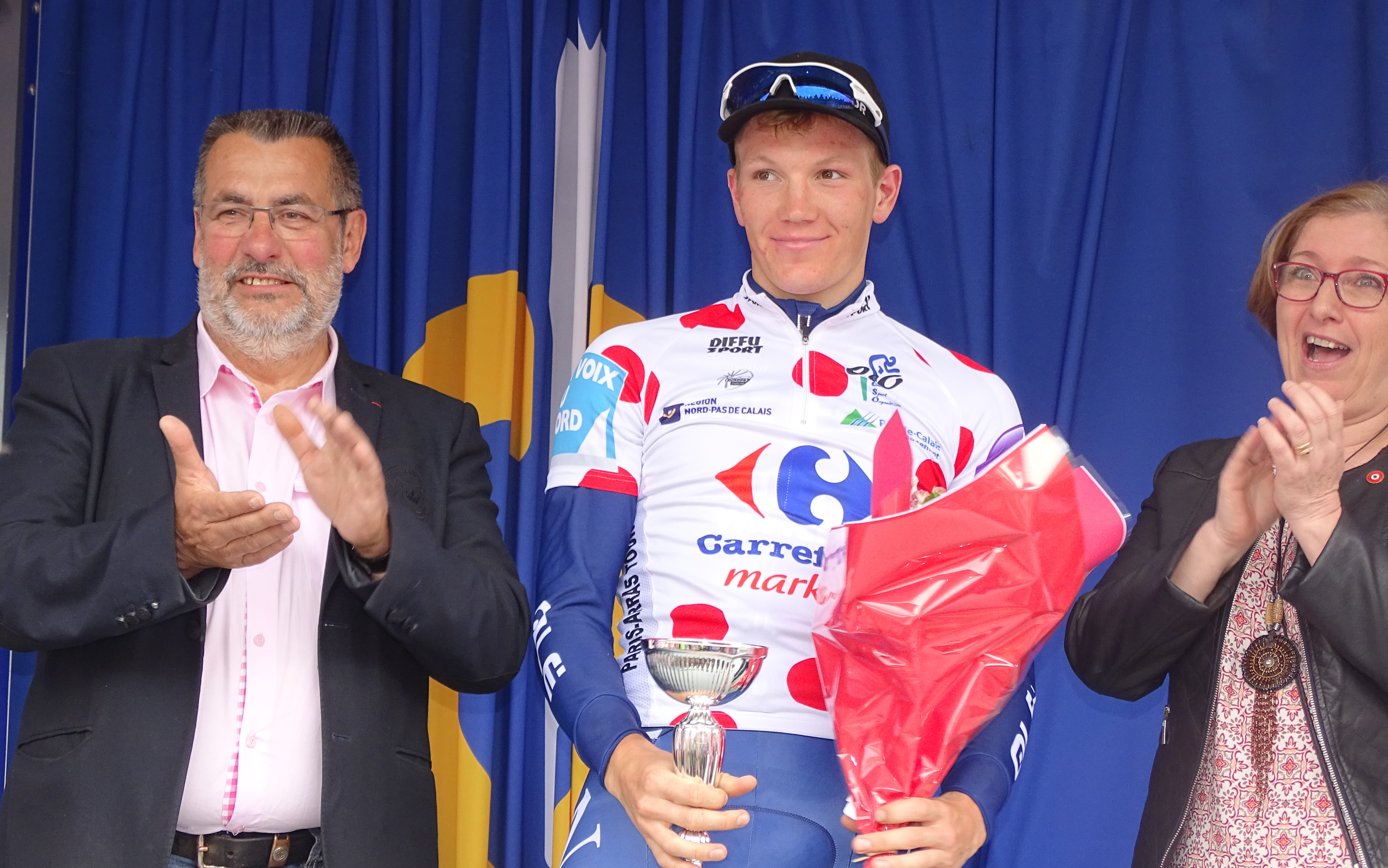 Reportage réalisé le dimanche 24 mai 2015 à l'occasion du départ et de l'arrivée de la troisième étape du Paris-Arras Tour 2015 à Arras, Pas-de-Calais, Nord-Pas-de-Calais, France.